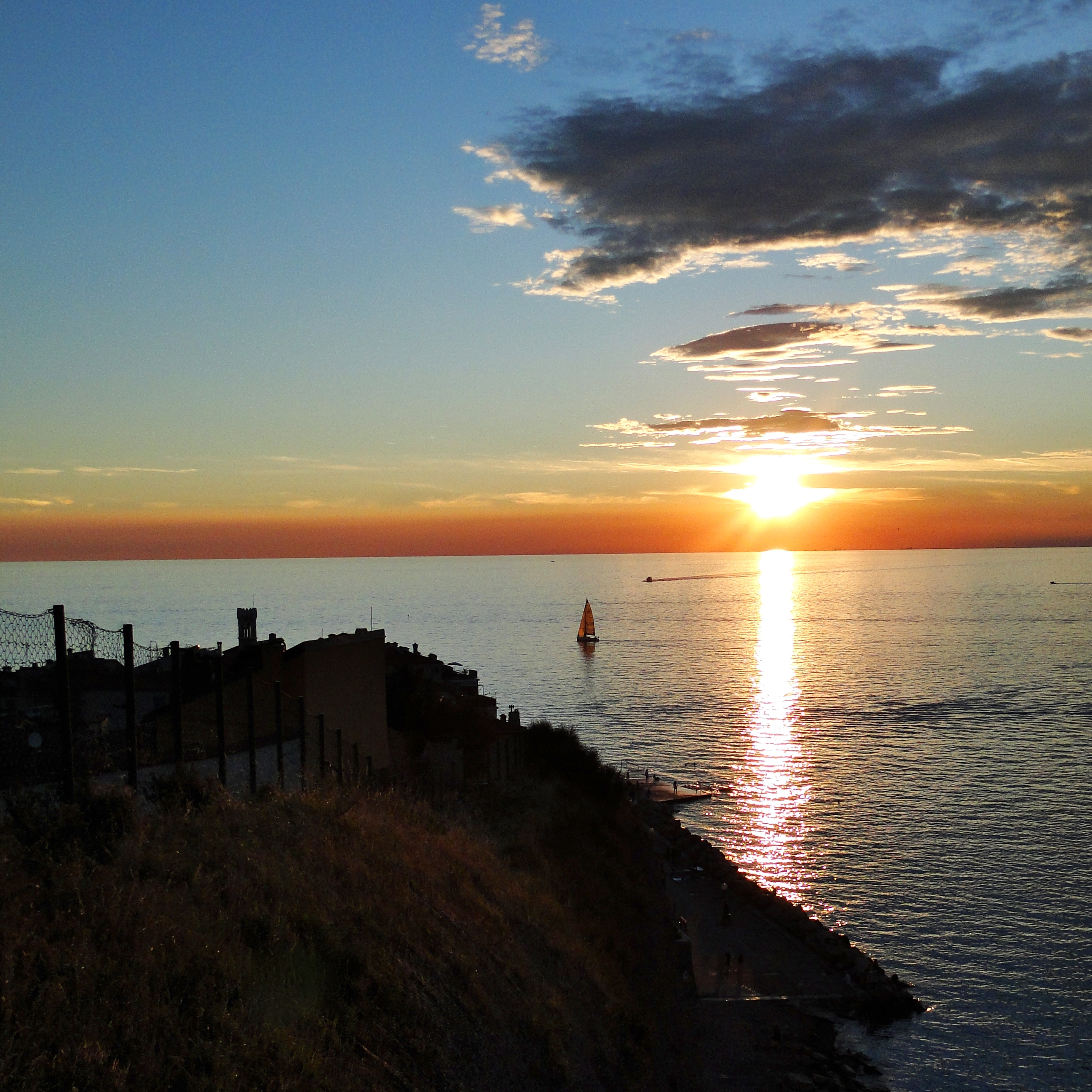 Posta de Sol des de la zona més alta de Piran (Eslovènia)